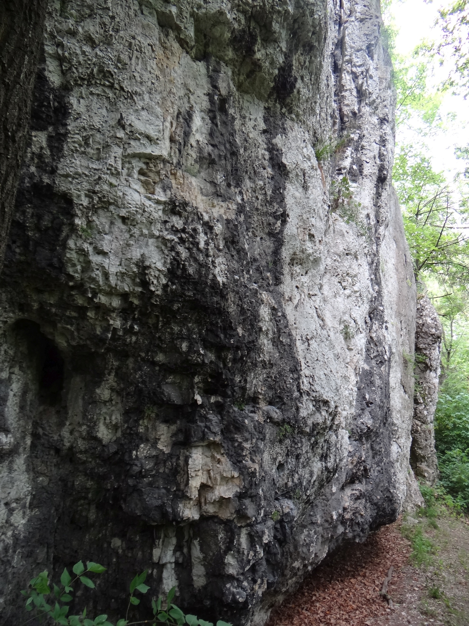 Skała Sanatorium w Wąwozie Ostryszni w Imbramowicach